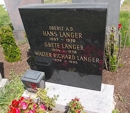 WalterRichardLanger-Atzgersdorfer Friedhof (1-51)